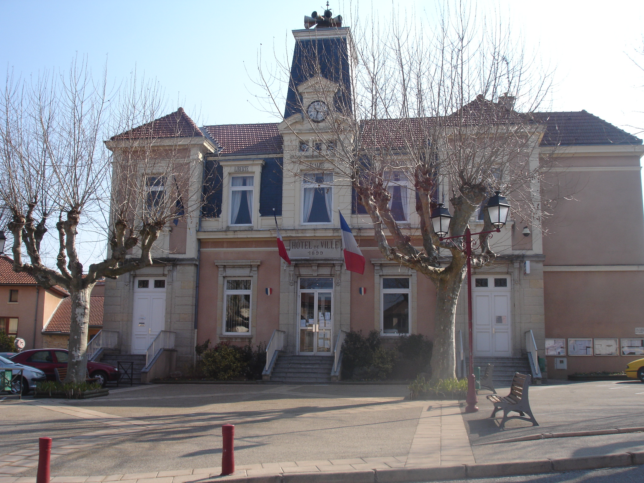 Heyrieux (38) : La Mairie